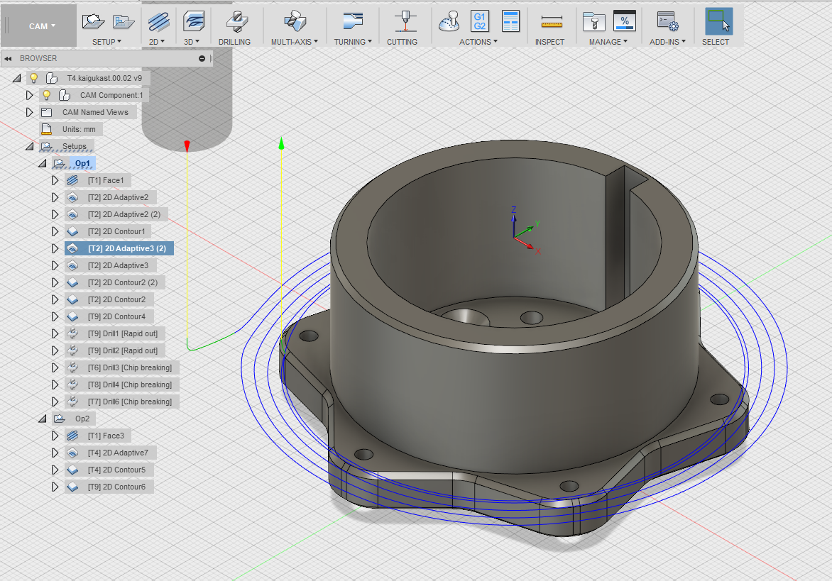 CAM näide Fusion 360's